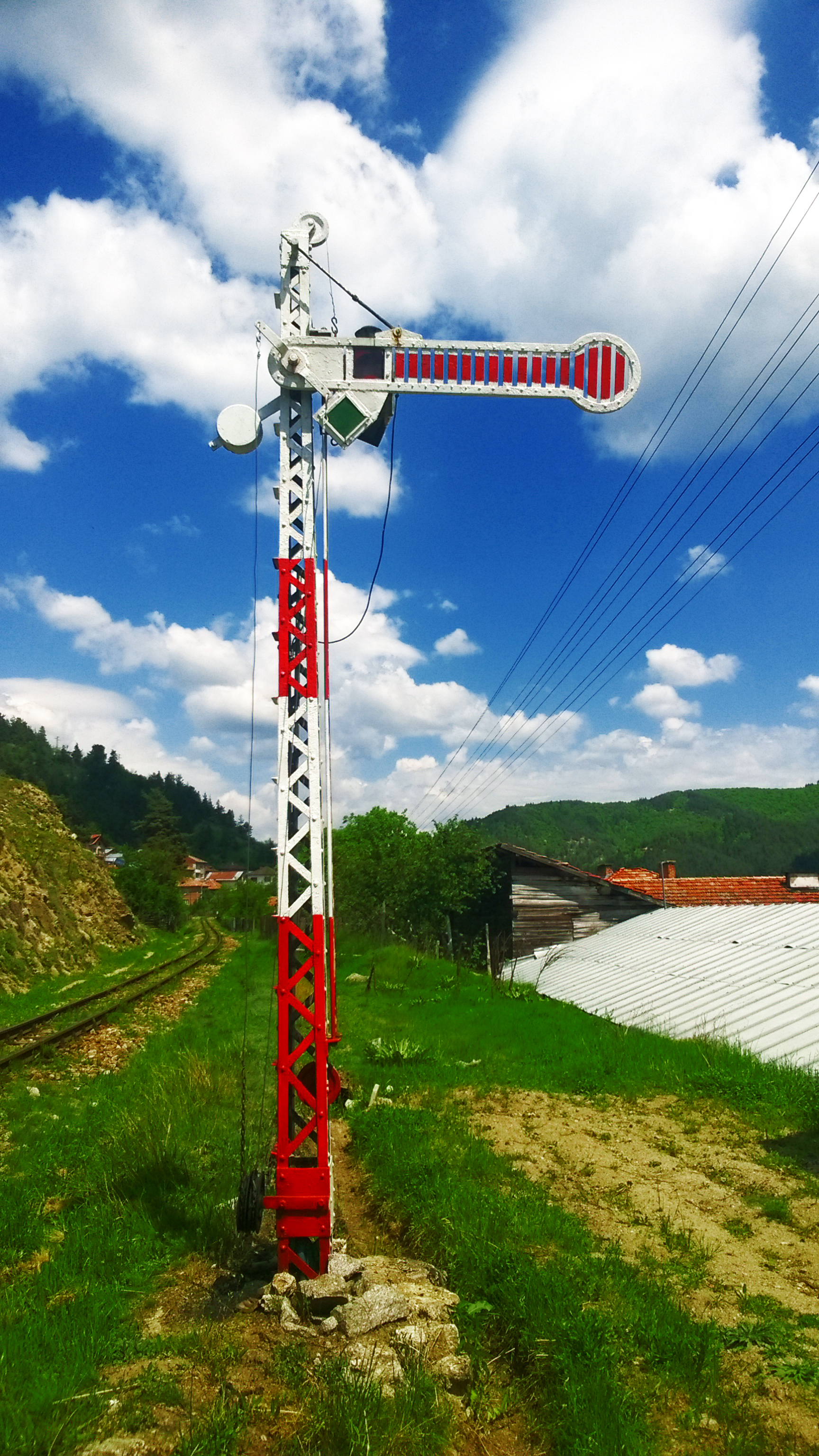 Входен семафор на гара Якоруда, страна Белица.